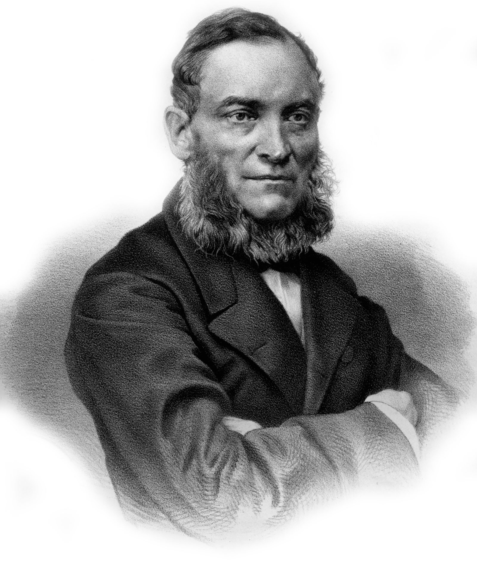 V. BUNJAKOWSKY. Съ Фотогр. Деньера. Лит. А. Мюнстера, СПБ. Imp. Lith. A. Munster (Editeur)